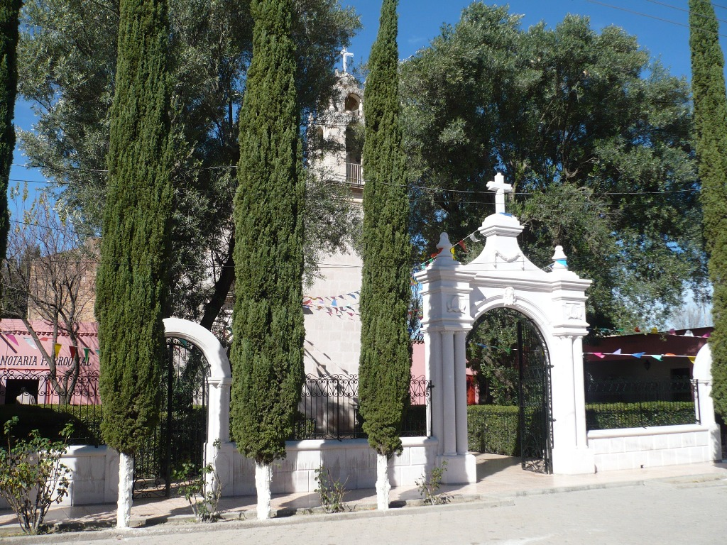 Fachada de la Parroquia de Ermita de Guadalupe, Jerez, Zacatecas, México